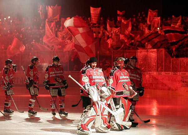 Der Mannschaftseinlauf kurz vor Spielbeginn.